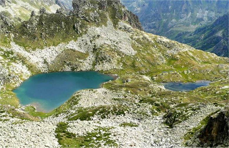 Etang des Redouneilles des brebis - Ariège - Vallée de Siguer